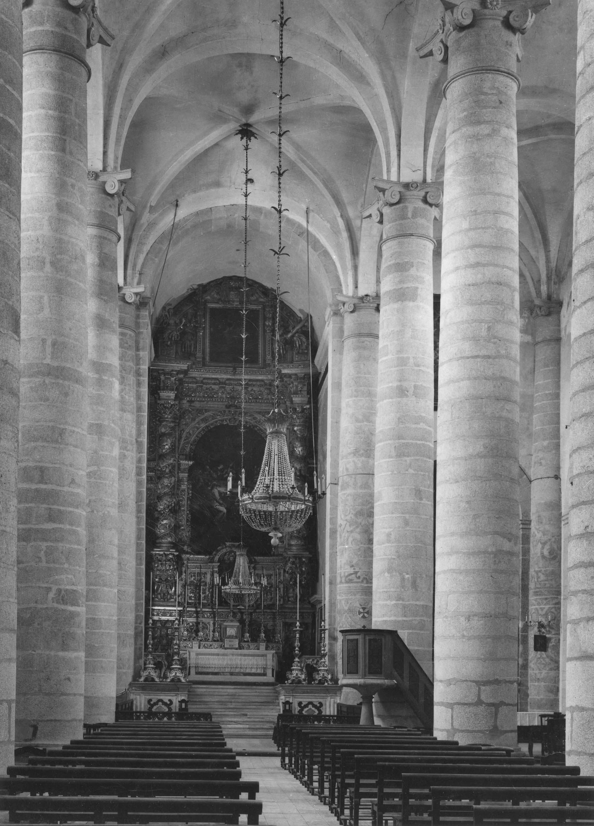 Interior of Santo Antão Church in Évora, Portugal. Fotógrafo: Mário Novais, 1899-1967. Orientador científico: Mário Tavares Chicó, 1905-1966. Data aproximada da produção da fotografia original: 1954. [CFT015.070.ic]